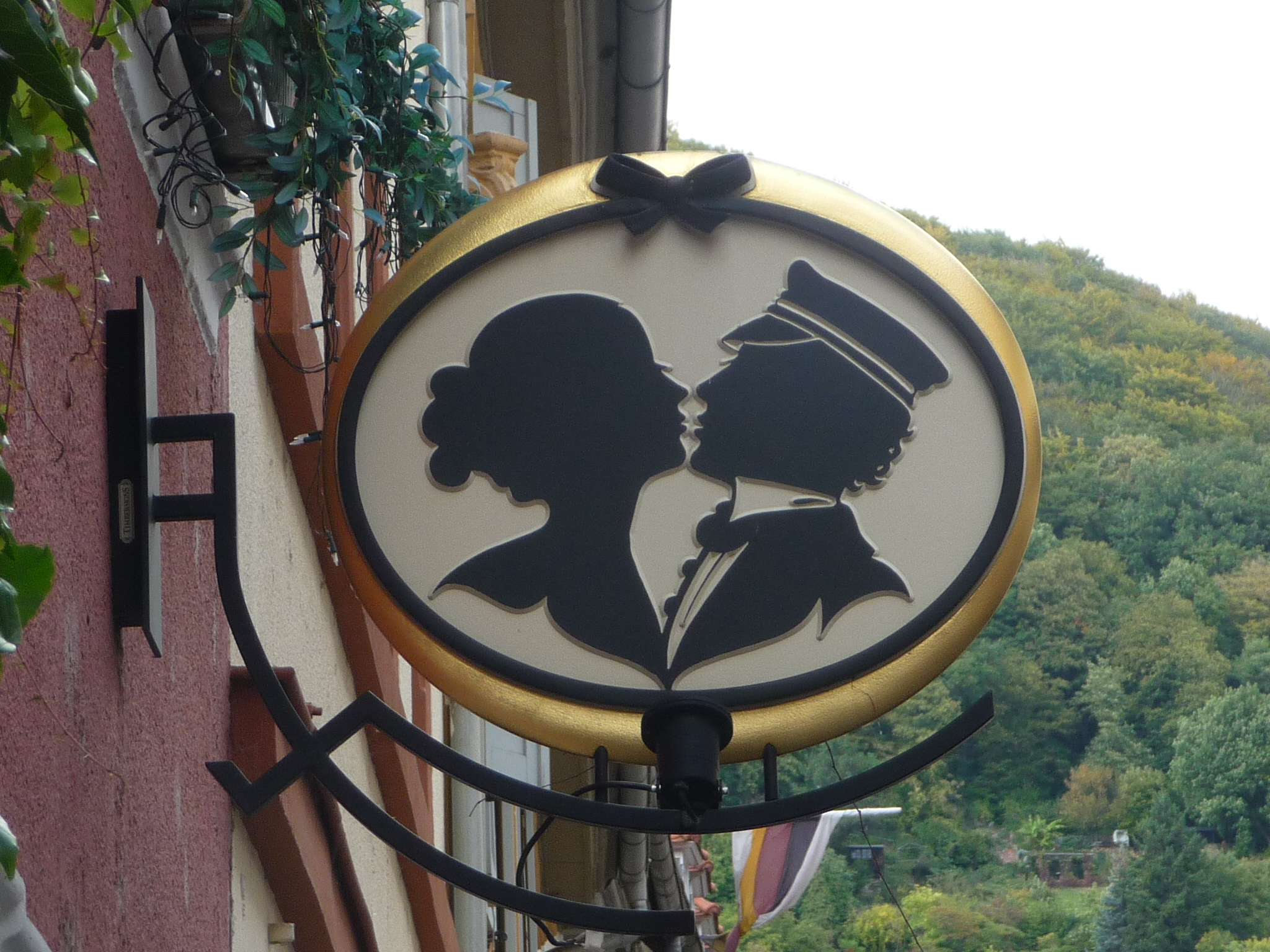 Heidelberg